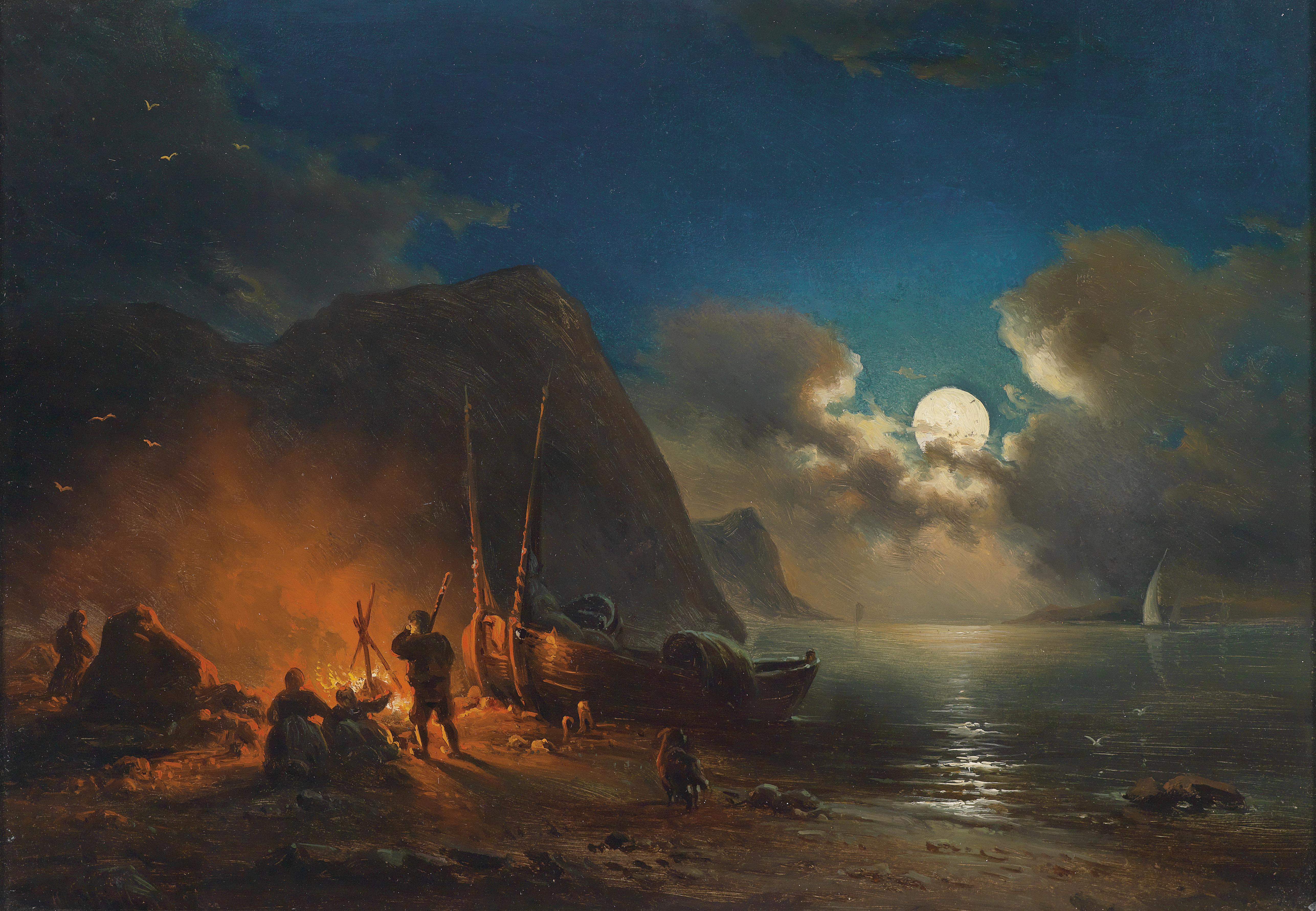 Romantisches Lagerfeuer im Mondschein